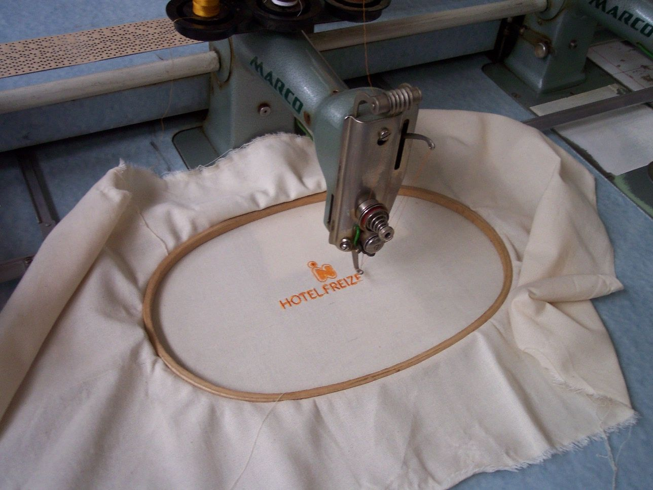 Stickmaschine